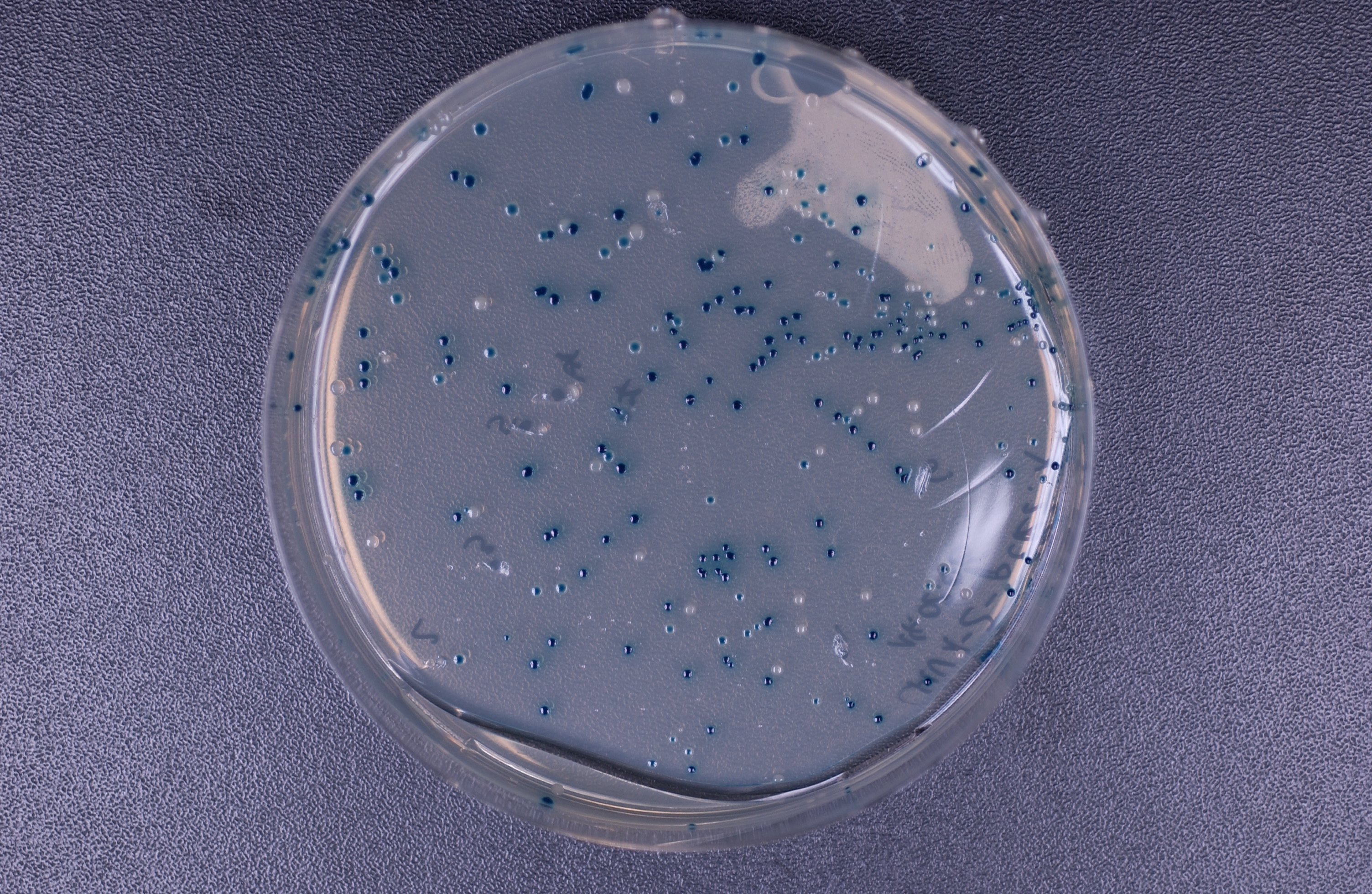 Transformation auf LB-Medium mit Ampicillin und X-Gal